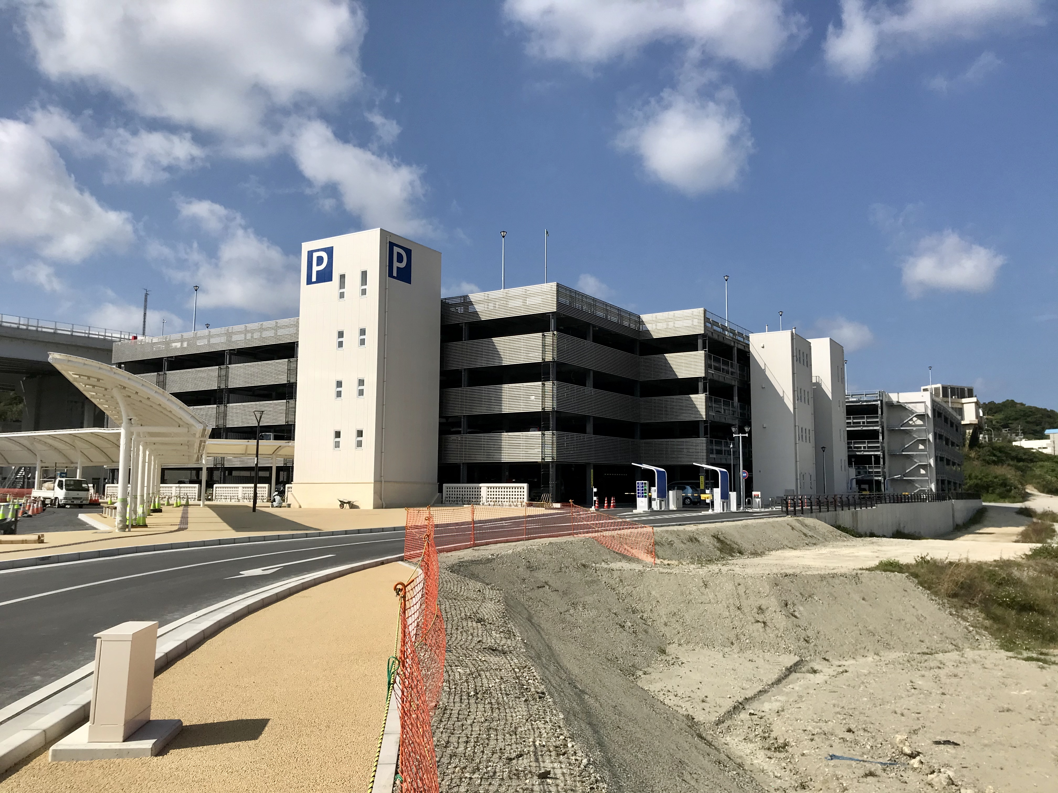 沖縄都市モノレール（ゆいレール）てだこ浦西駅パークアンドライド駐車場